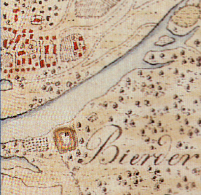 Plan von Bierde in Kurhann. Landesaufnahme 1779